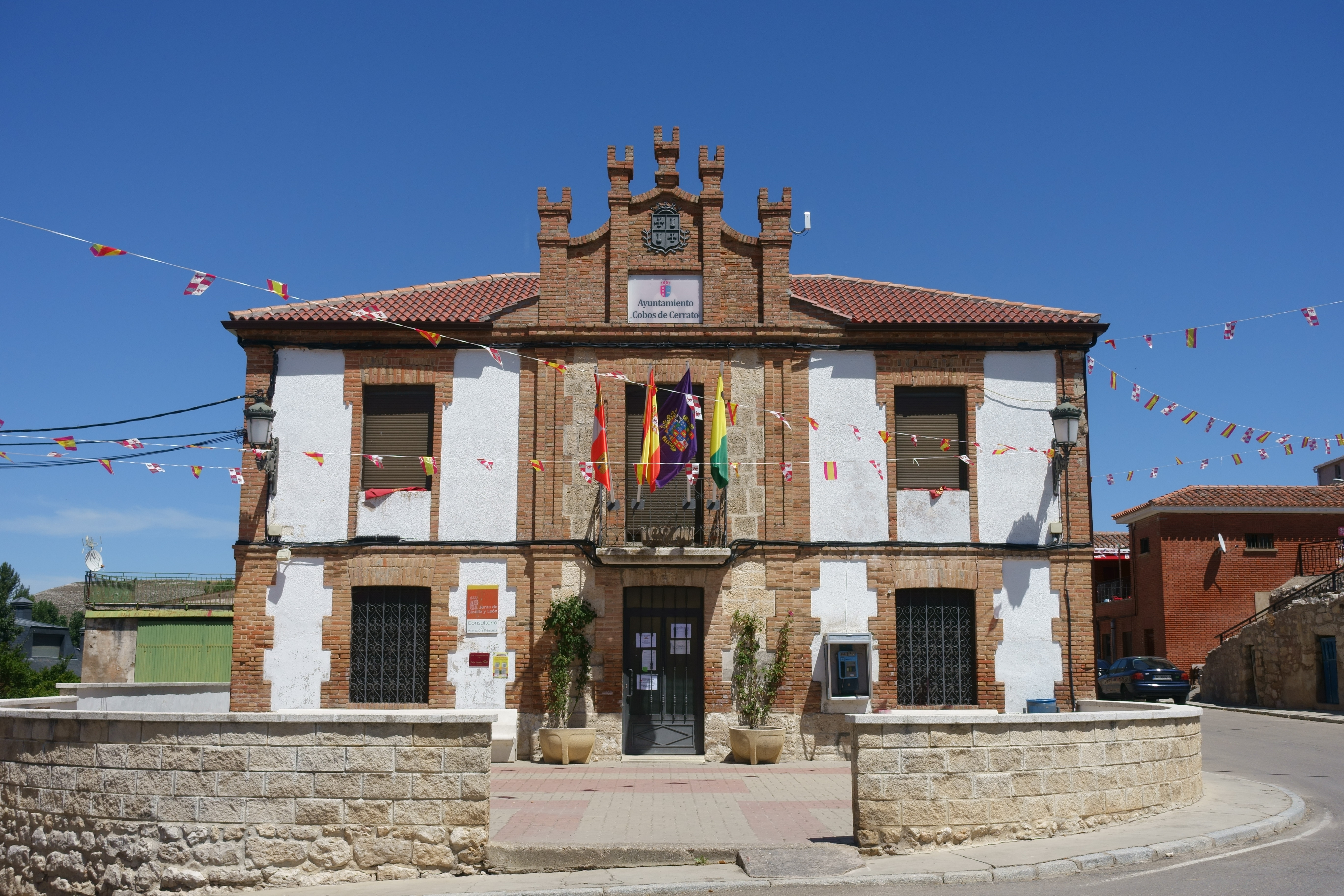 Casa consistorial de Cobos de Cerrato (Palencia, España).